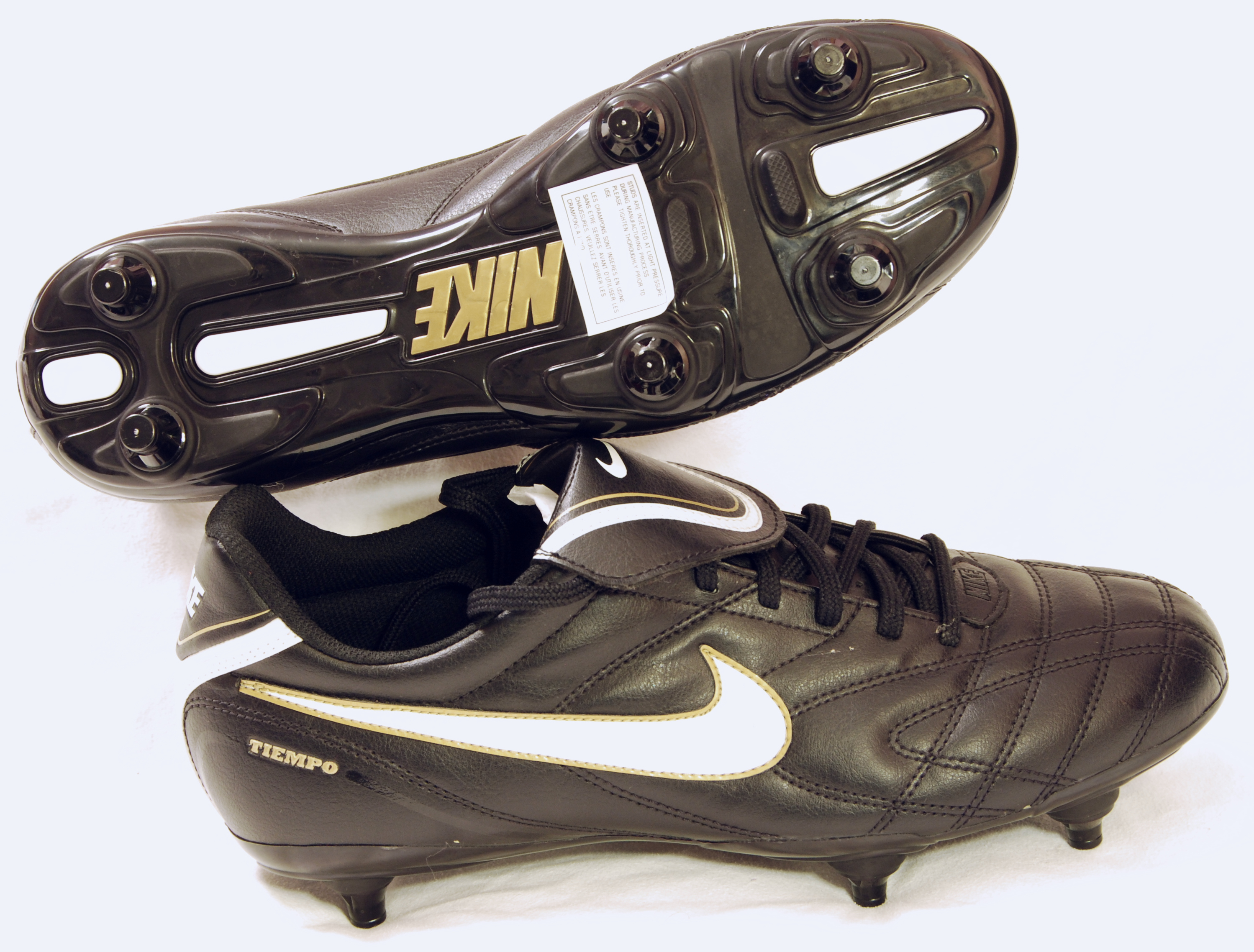 Nike Fussballschuhe mit Stollen (Metall/Kunststoff)